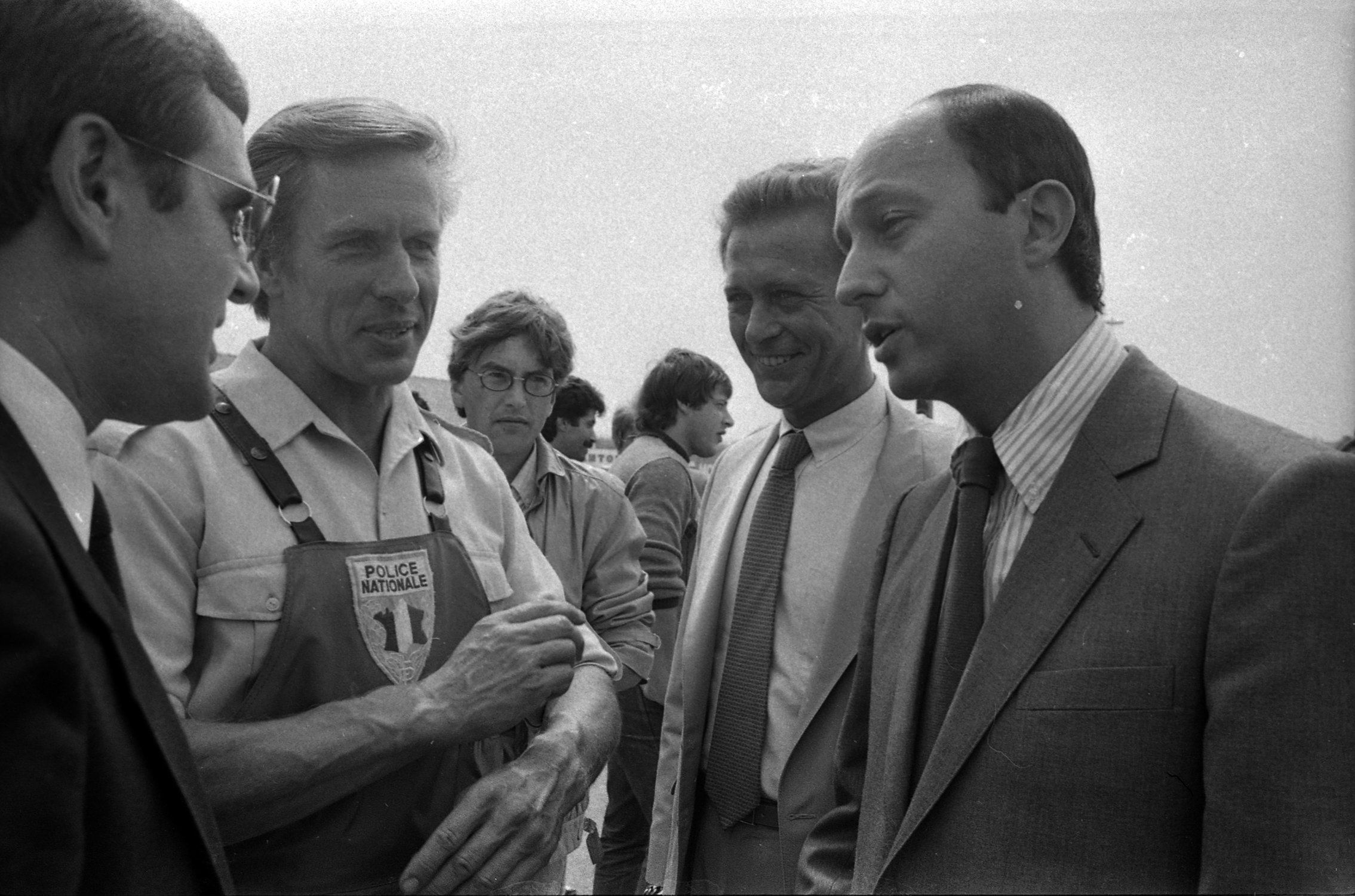 Pas de lieu. Le 28 Août 1984. Vue de Dominique Baudis et de Laurent Fabius en visite à l'extérieur.